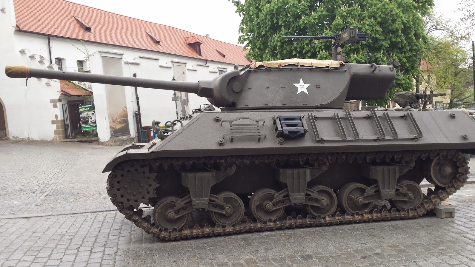 M36 Jackson gesehen auf der Militärparade in Pilsen, CZ